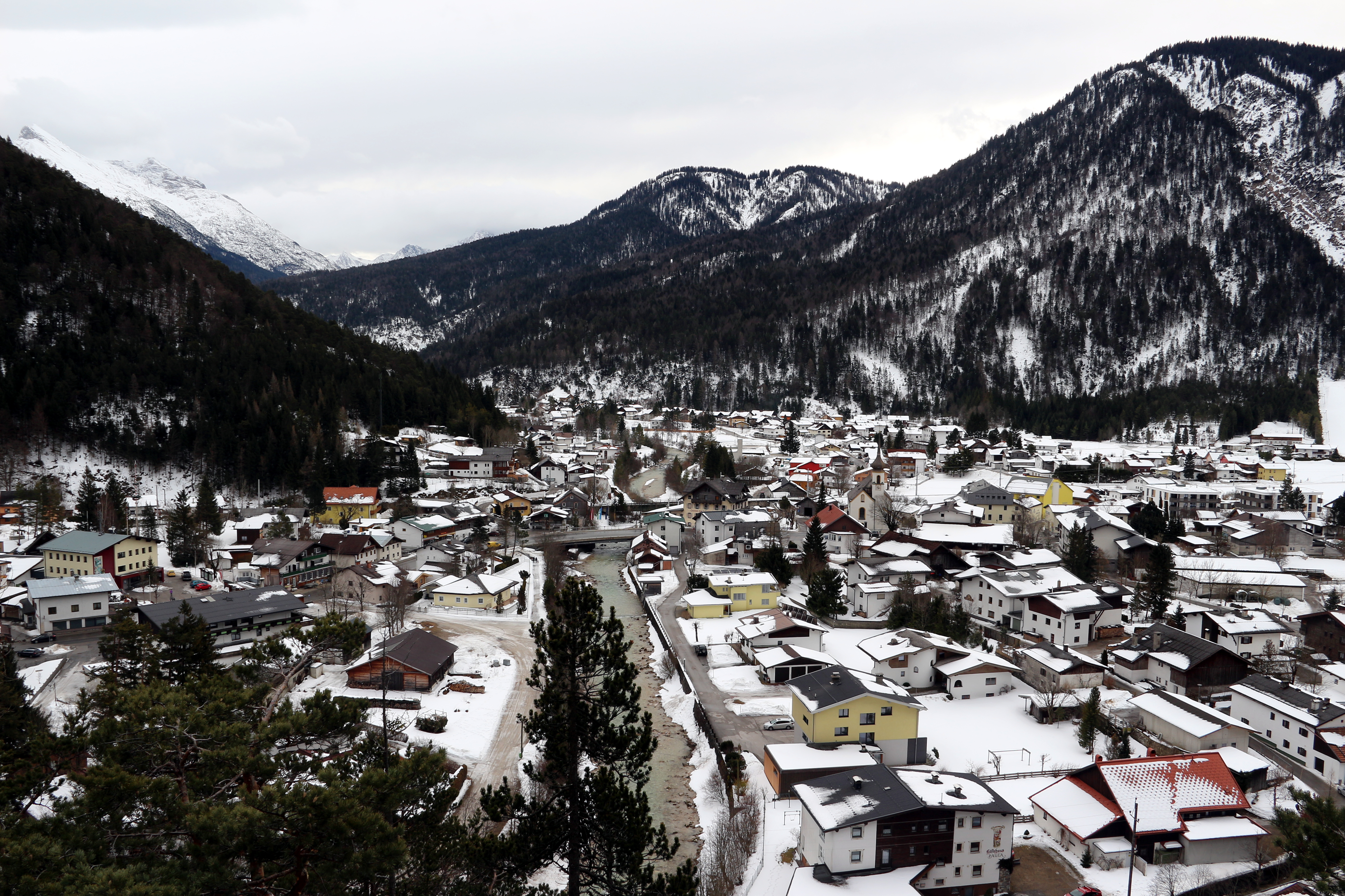 Ortsansicht von Scharnitz, Tirol, gesehen vom Kalvarienberg (Westen).